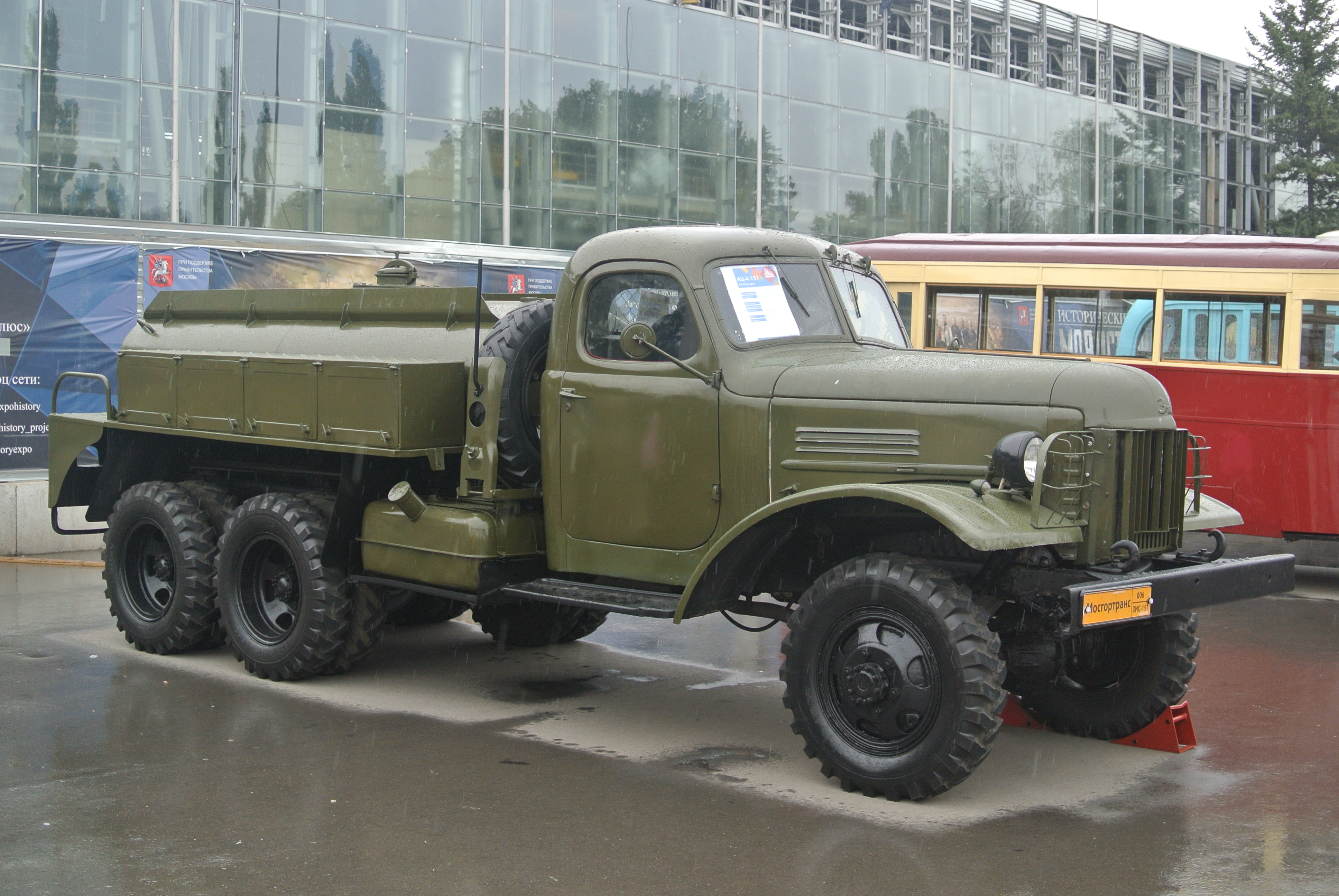 Автоцистерна АЦ-4-151 на базе грузовика ЗИС-151. Экспозиция Мосгортранс на ВВЦ